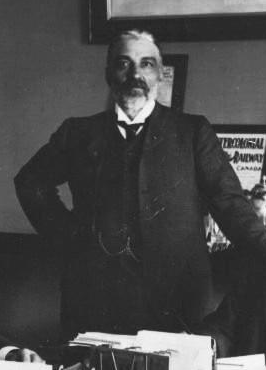 William Alexander Weir, circa 1905